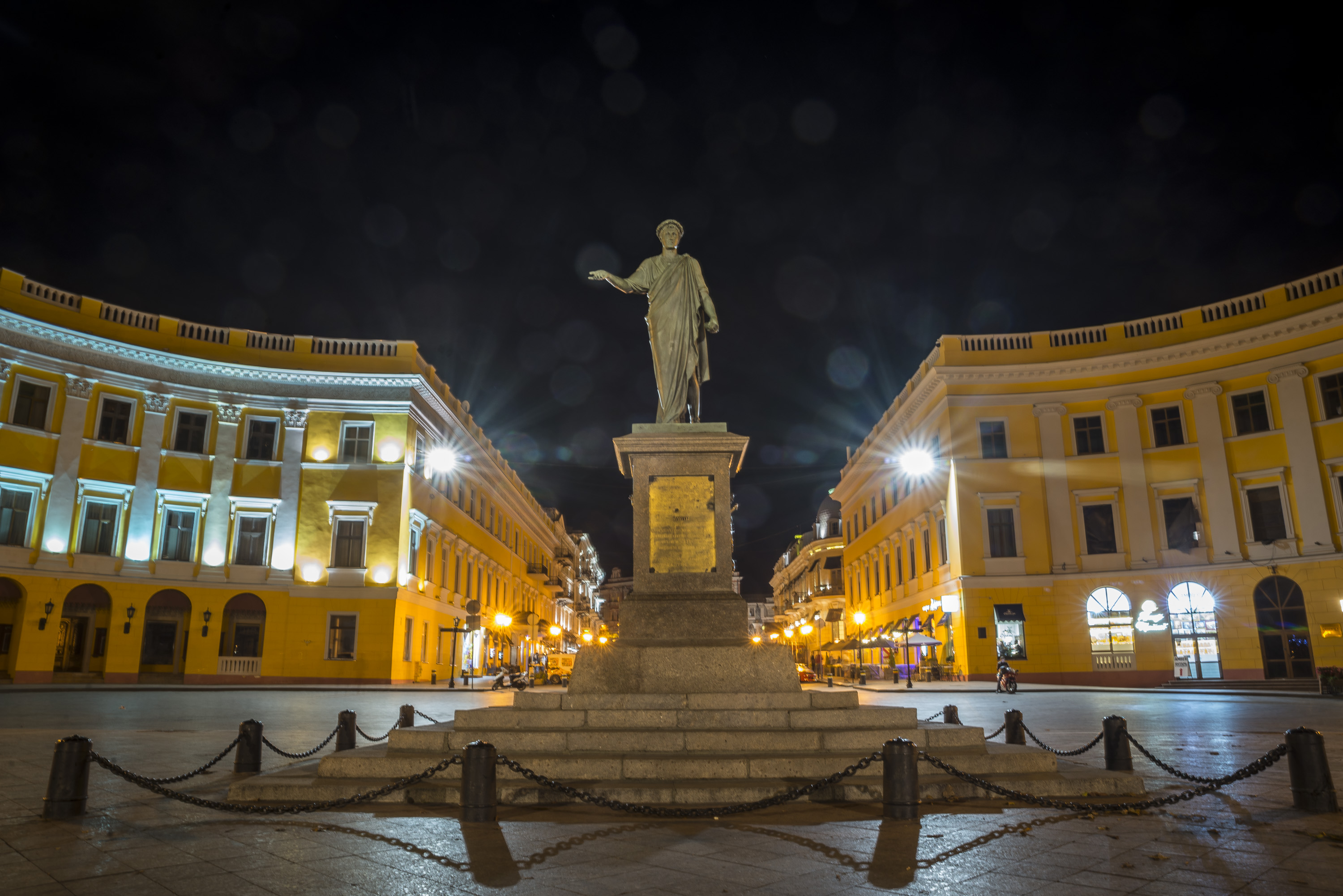 Пам'ятник генерал-губернатору Новоросійського краю А.Е. Ришельє, Одеса, Приморський бул.